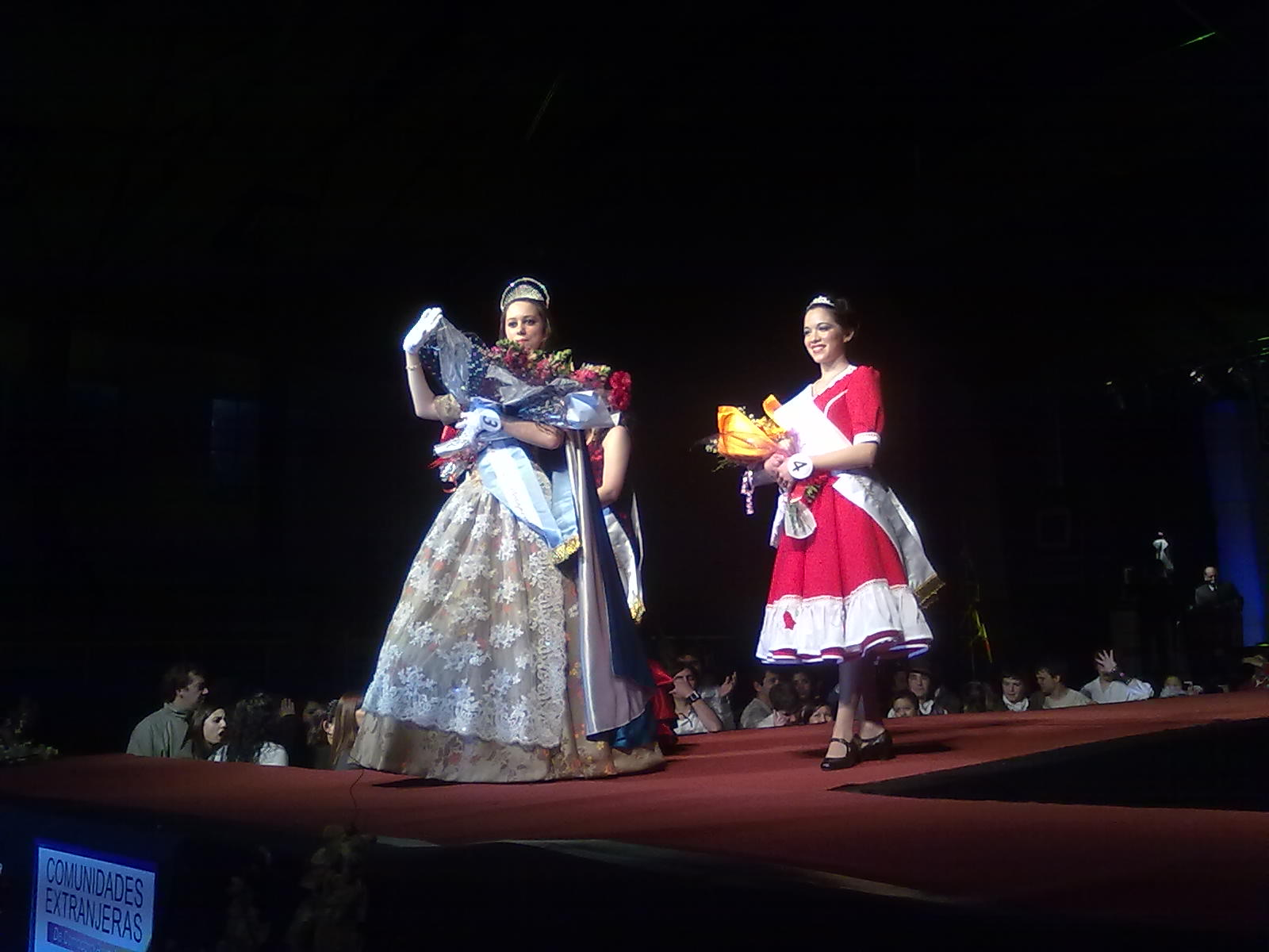 la elecion de la reina nacional de las comunidades extranjeras tras coronar a la reina y princesas en 2010